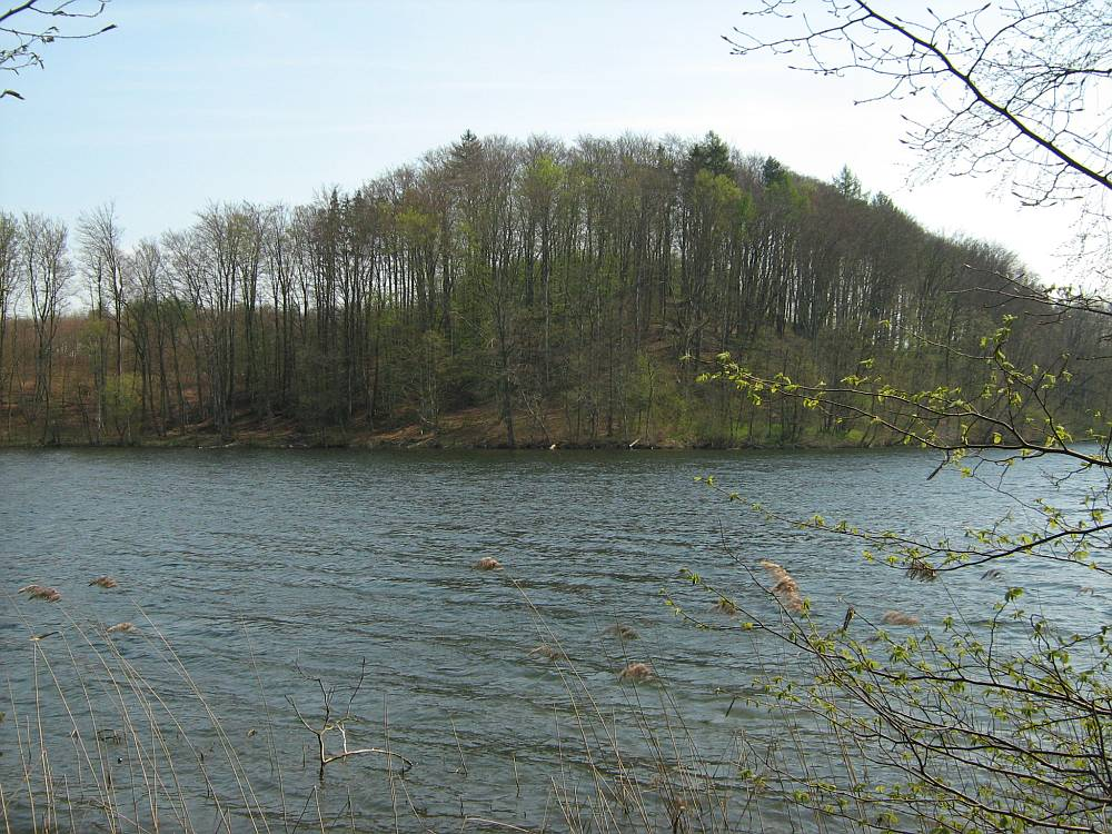 Jezioro Kamienica. Góra Zamkowa przy północnym krańcu jeziora.